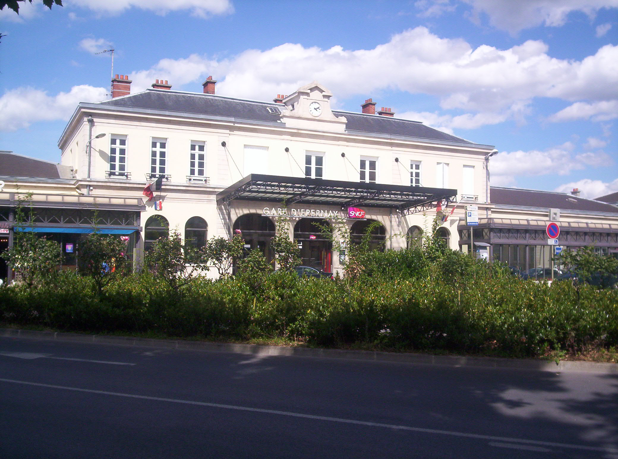 Gare SNCF d'Épernay